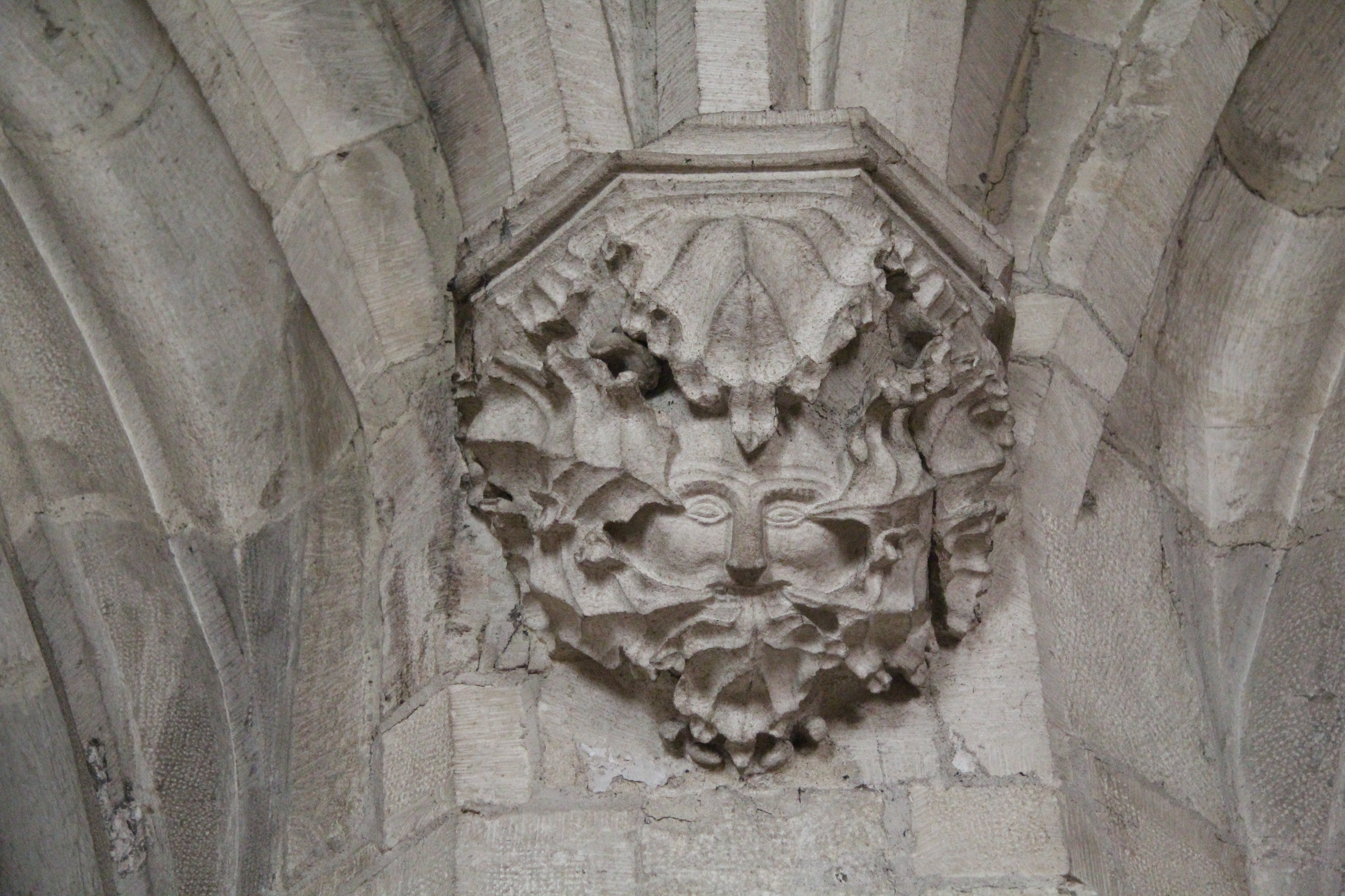 In der gotischen Stadtkirche von Hermannstadt (Sibiu) taucht an zwei Stellen im nördlichen Seitenschiff der Grüne Mann auf.